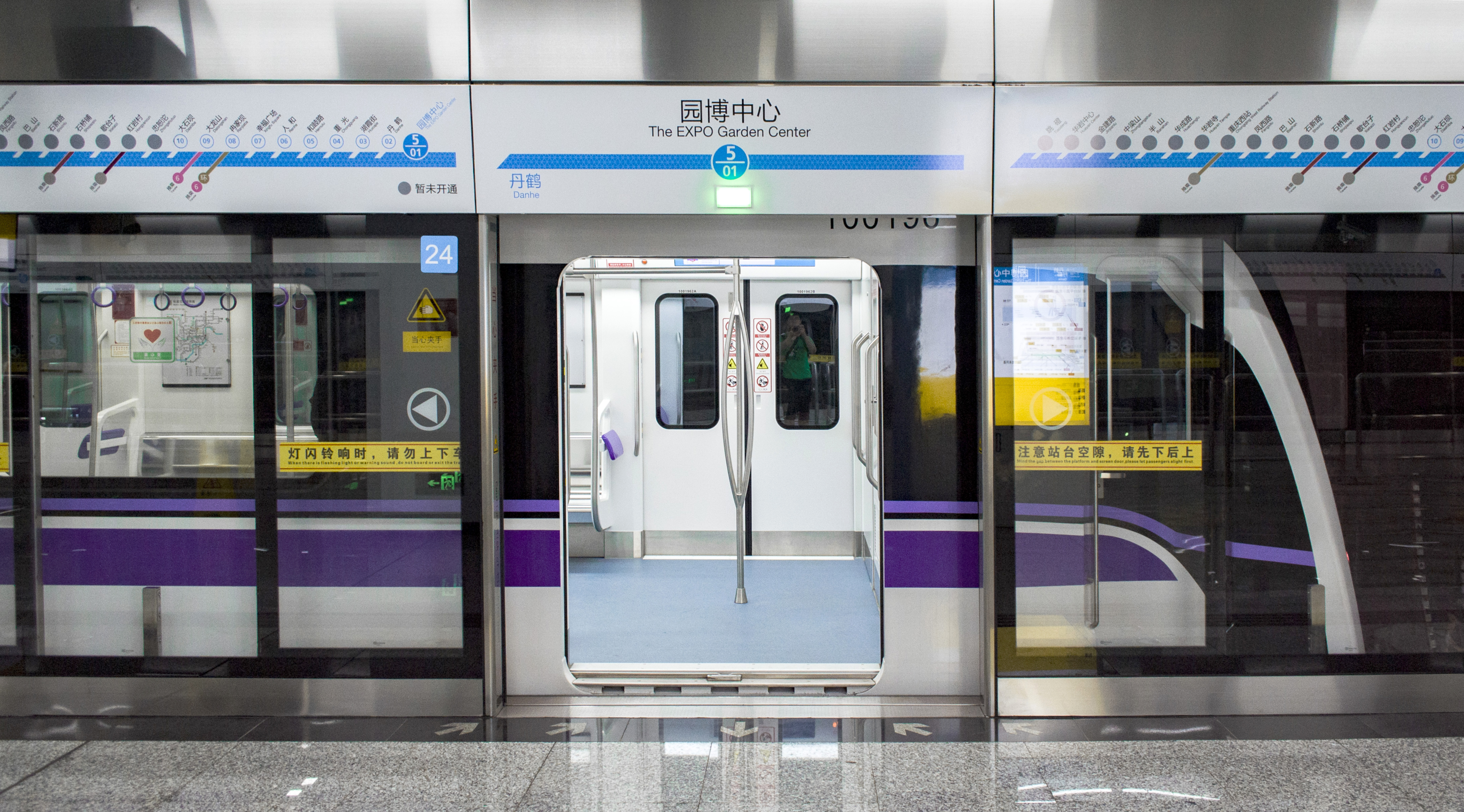 中文（中国大陆）: 重庆轨道交通「互联互通」示范工程测试线，10号线列车运行于5号线园博中心站